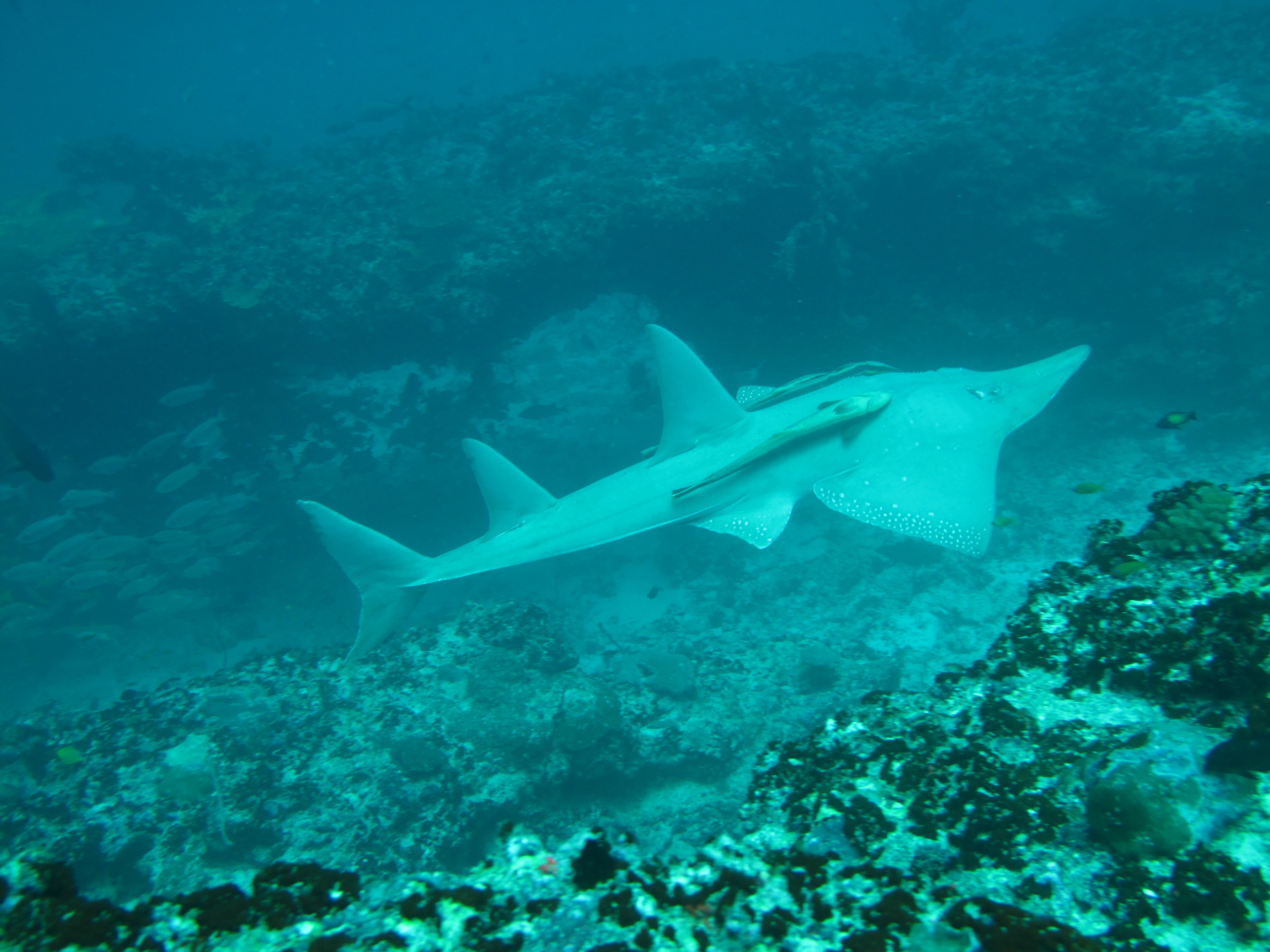 Gitarrenhai in ca. 25m Tiefe. Grundnah wie üblich und recht fix völlig unbeeindruckt an der Tauchgruppe vorbeigezogen.